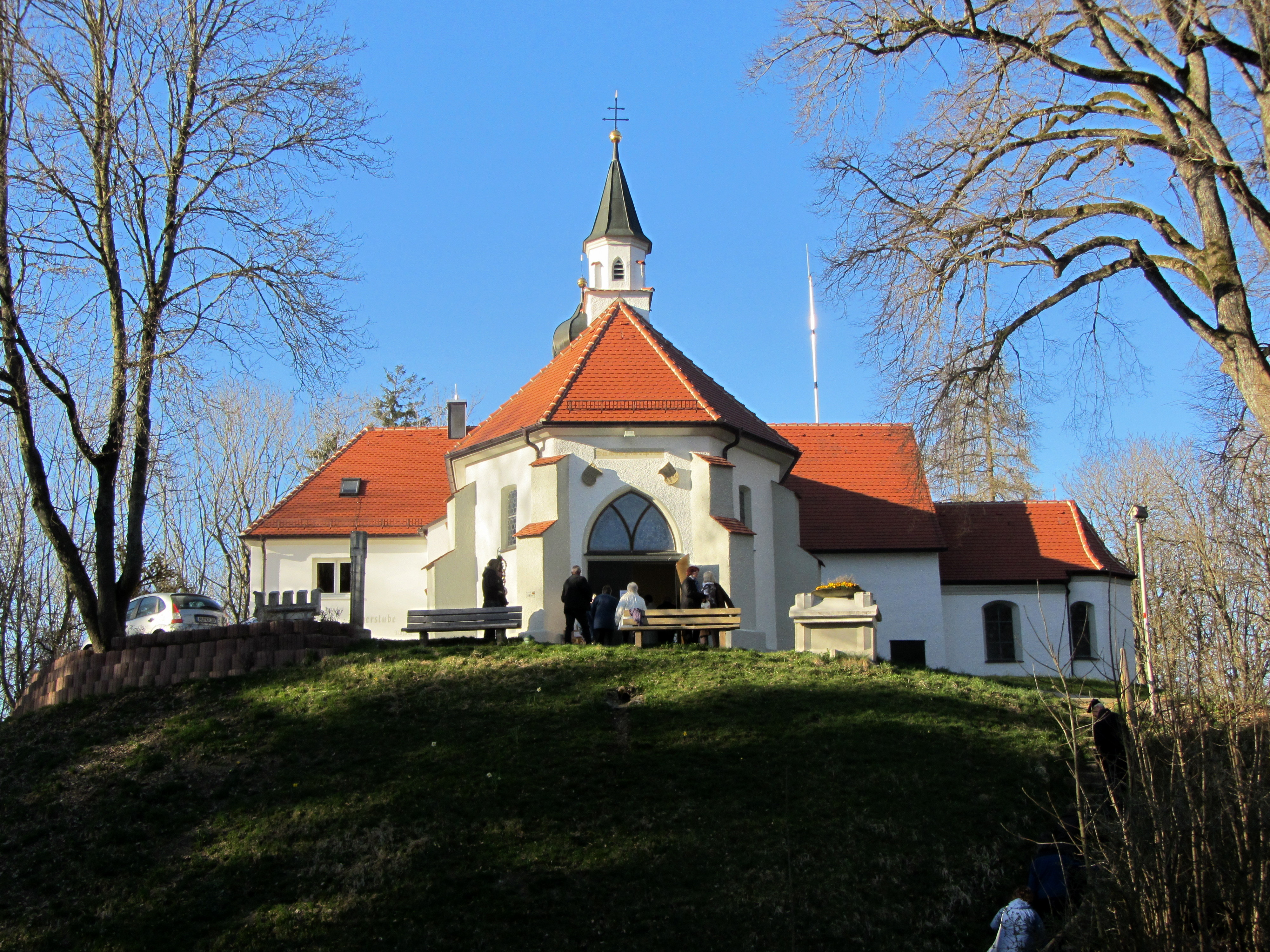 Maria im Busch